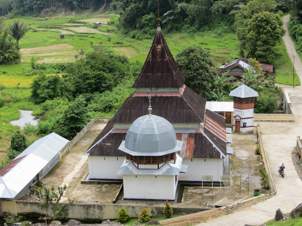 Masjid Pincuran Gadang